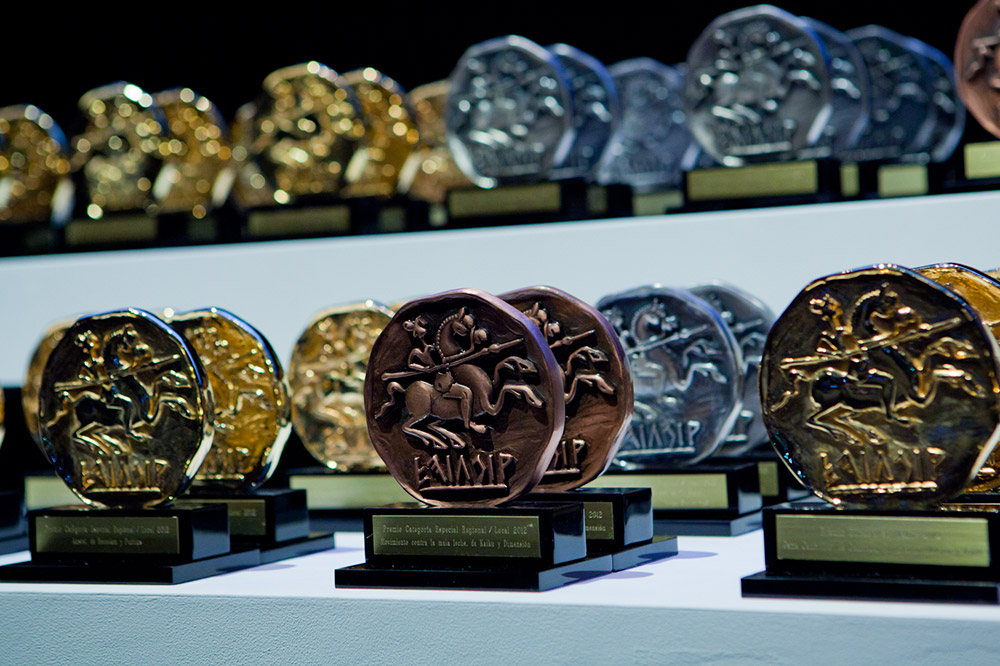 Trofeos de los Premios a la Eficacia en Comunicación Comercial 2012, convocados por la Asociación Española de Anunciantes.